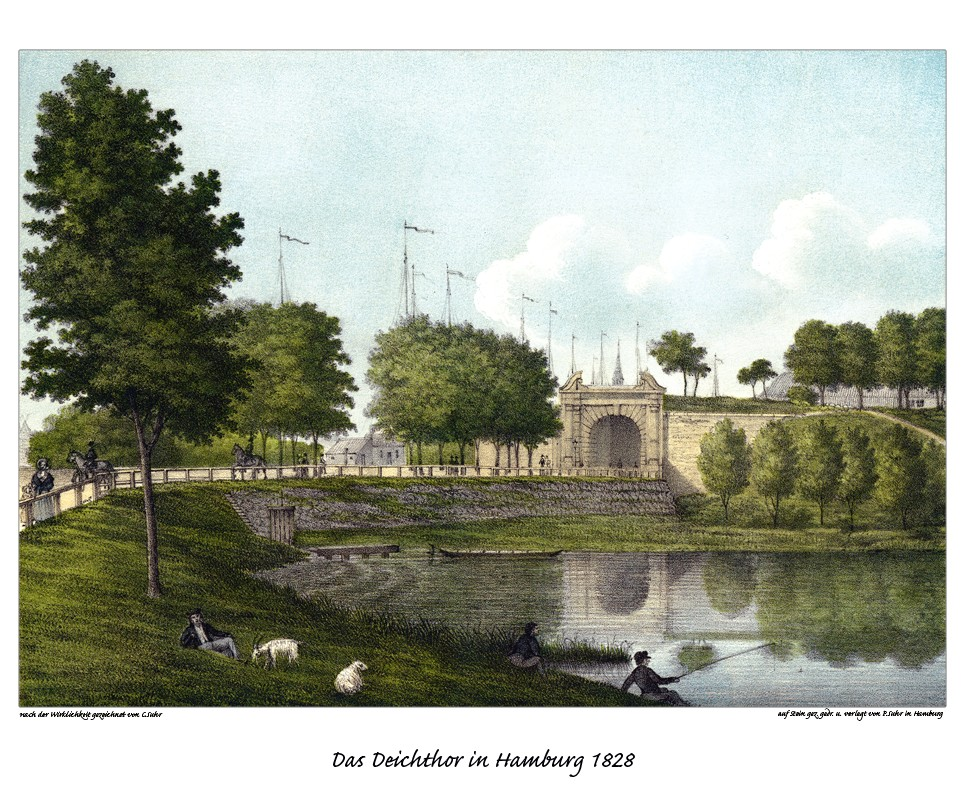 Das Deichthor in Hamburg 1828, gezeichnet von Christoffer Suhr, Litho von Peter Suhr